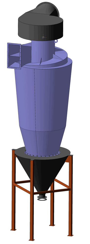 ЦКО общий вид